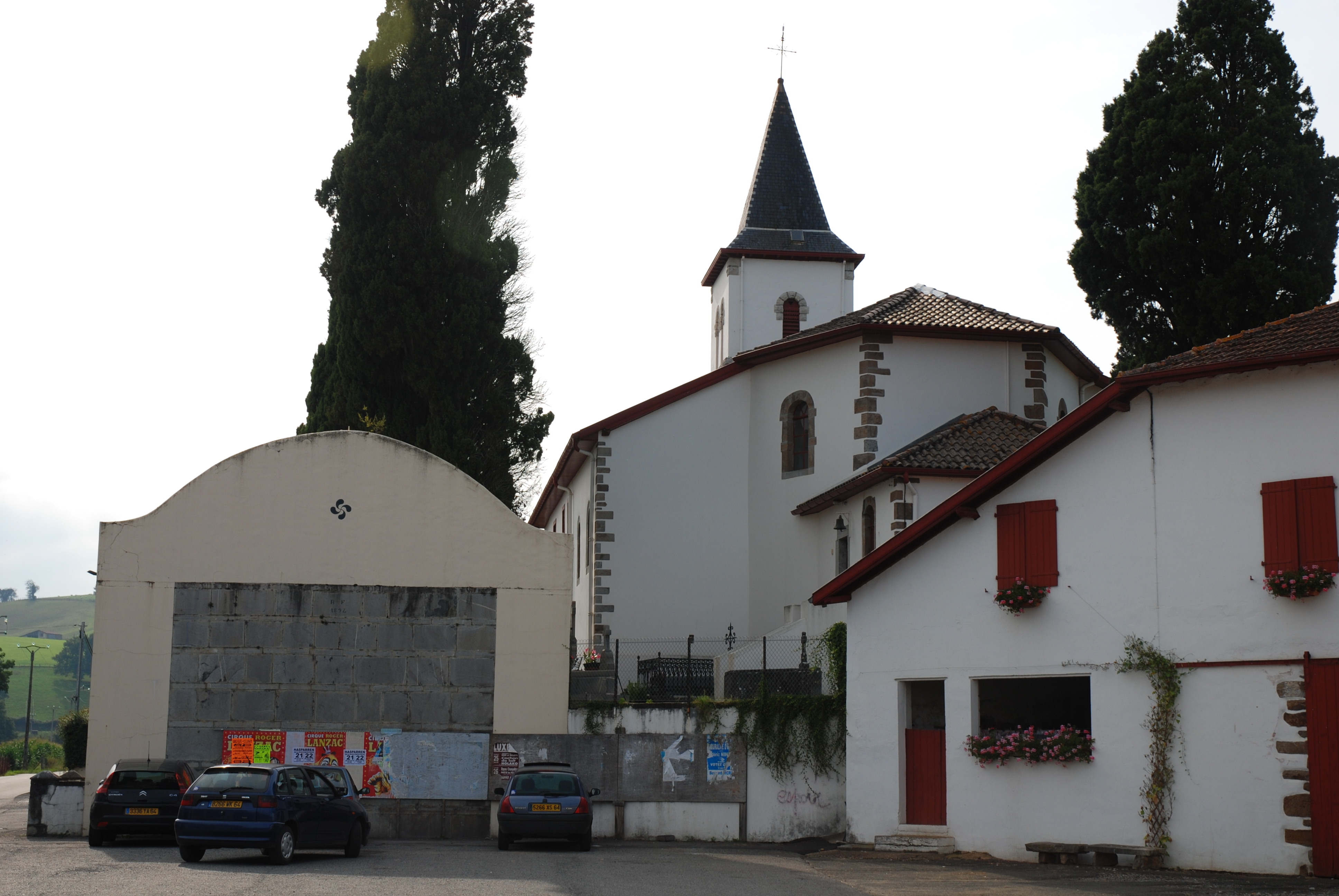 Méharin, fronton place libre, adossé à l'église